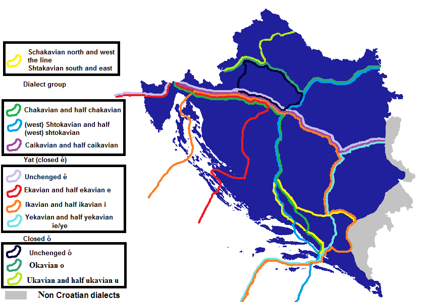 Šćakavska isoglosa, čakavske, kajkavske i štokavske karakteristike refleski jata (zatvoreno e) i njegovog parnjaka (zatvoreno o)) Podaci preuzeti sa i ostalih datoteka kategorije Dodatni izvori Lisac, Lončarić, Lukežić